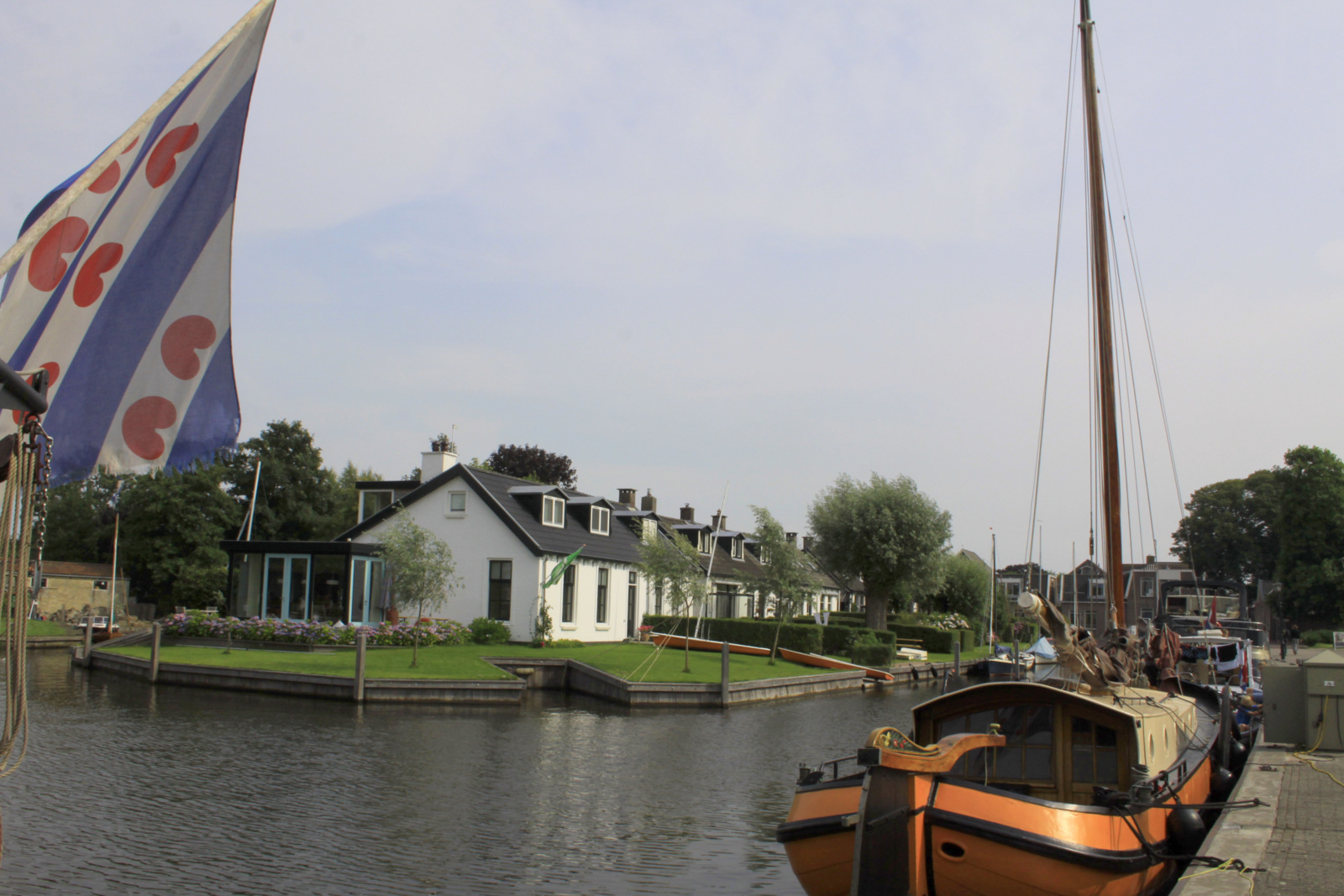 Langweer Watersportplaats.